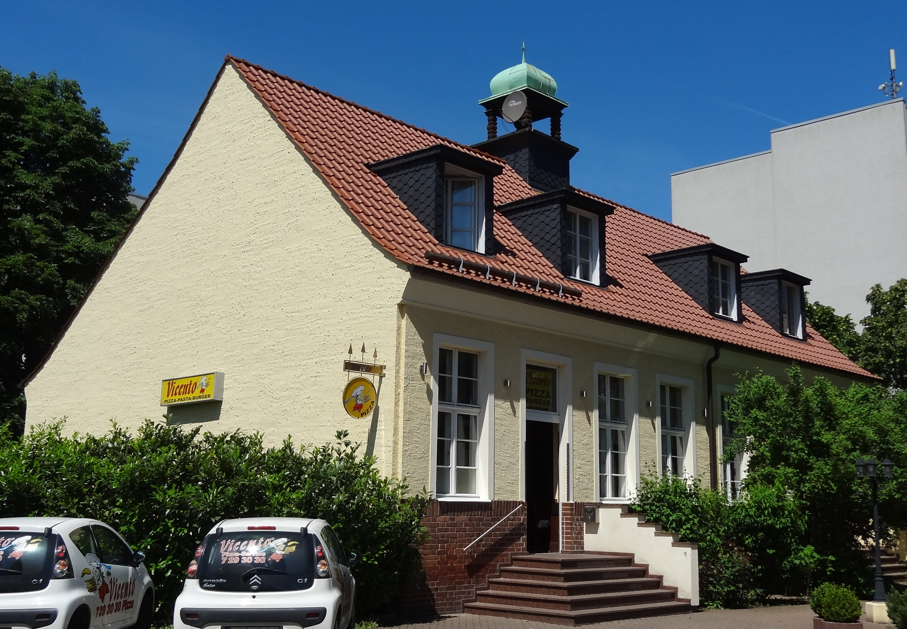 Bodelschwingh-Gemeindehaus